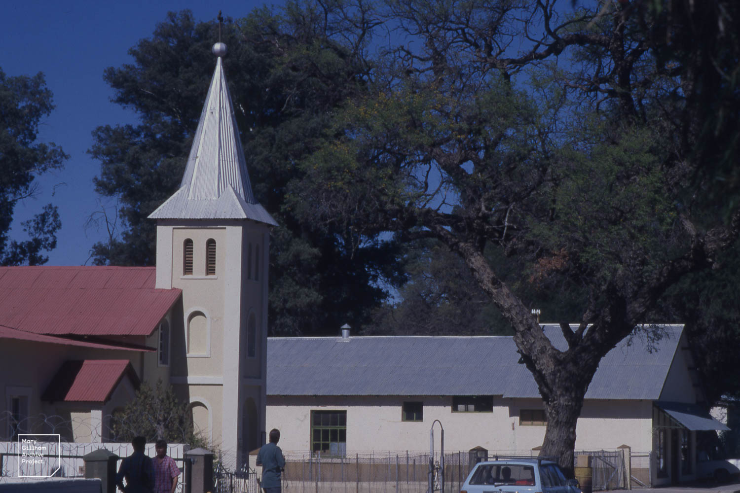 Omaruru. Dry river